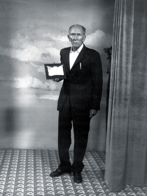 Canino, puparo di Alcamo